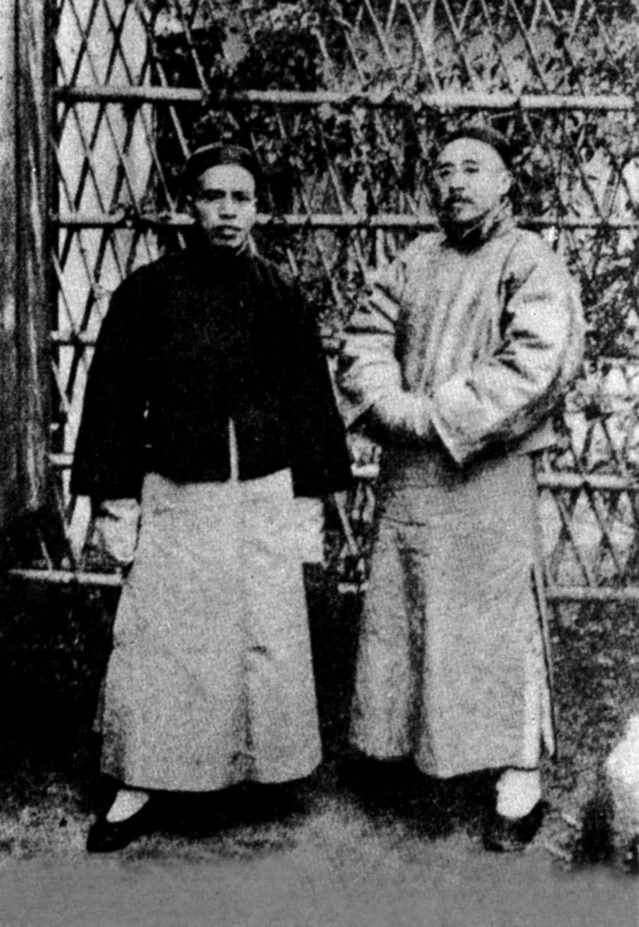 王國維和羅振玉